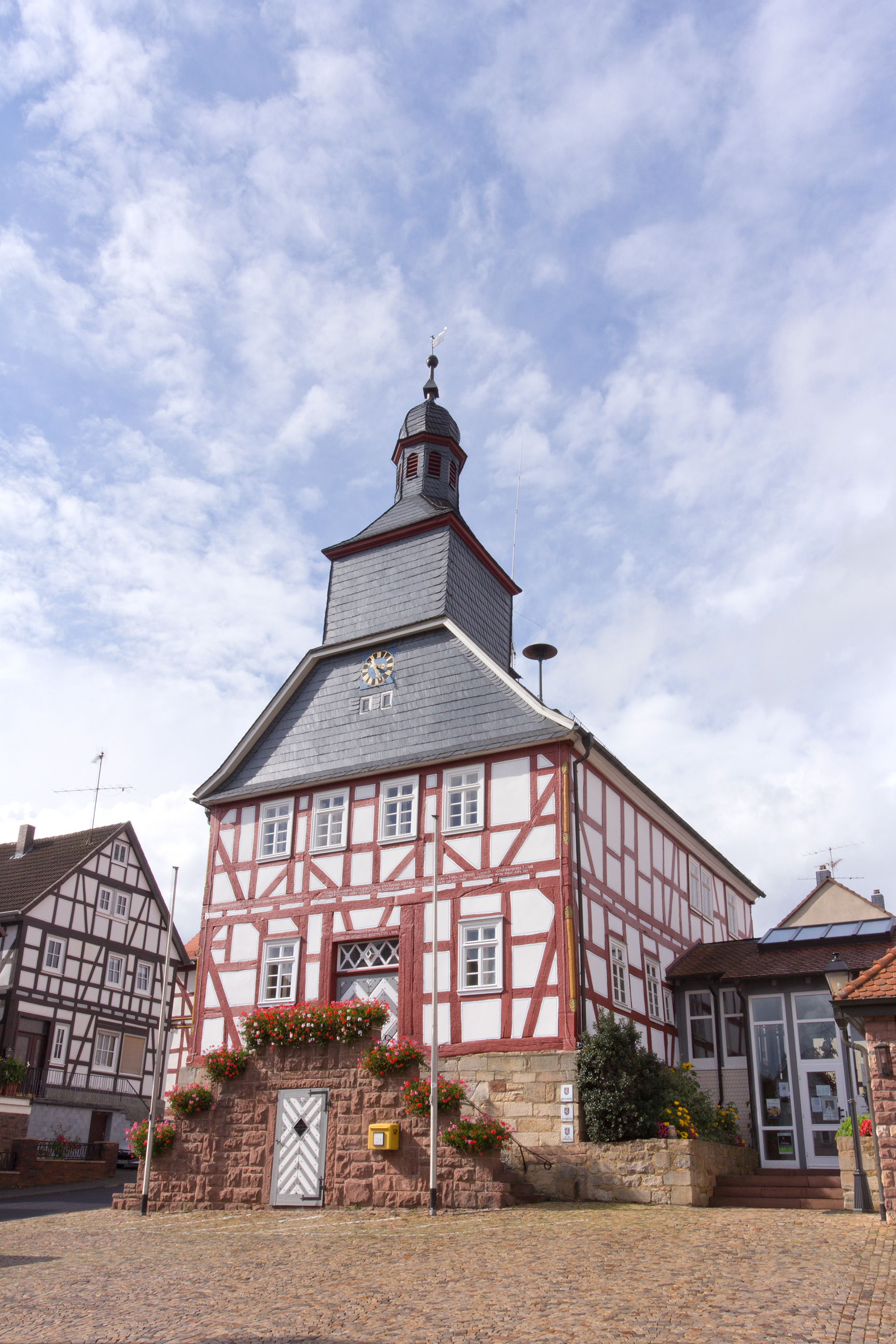 hist. Rathaus in Kirtorf im Vogelsberg;links das Haus Neustädter Tor 6.